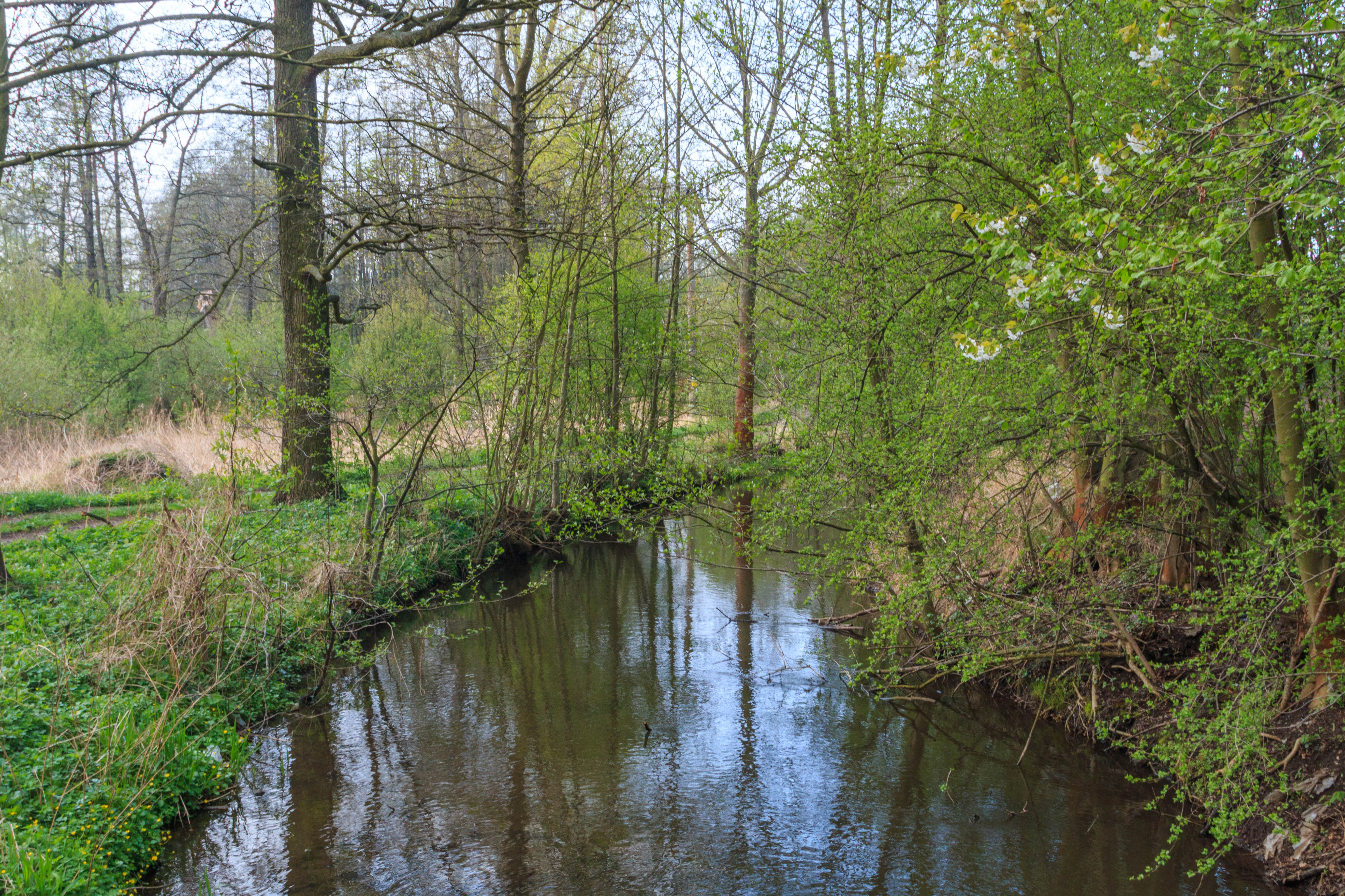 Labský náhon u Plačic Project: Vodstvo.